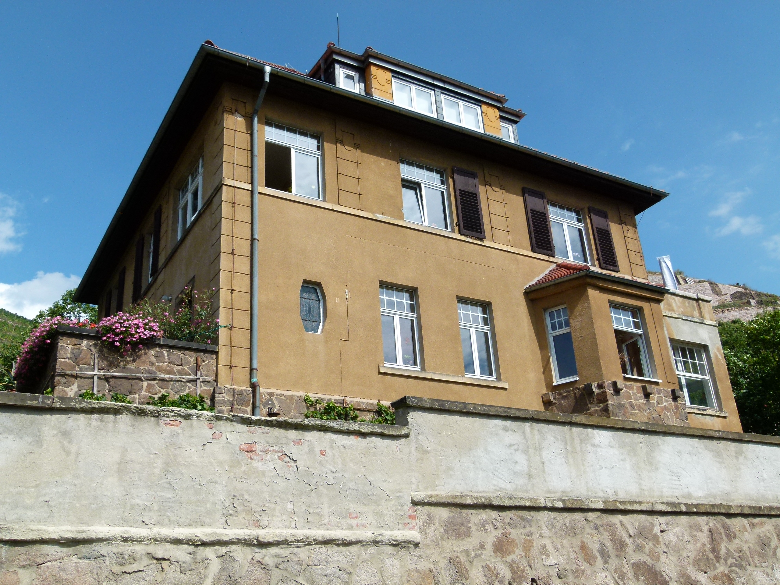 Denkmalgeschütztes Haus, Am Goldenen Wagen 12, Radebeul, Sachsen